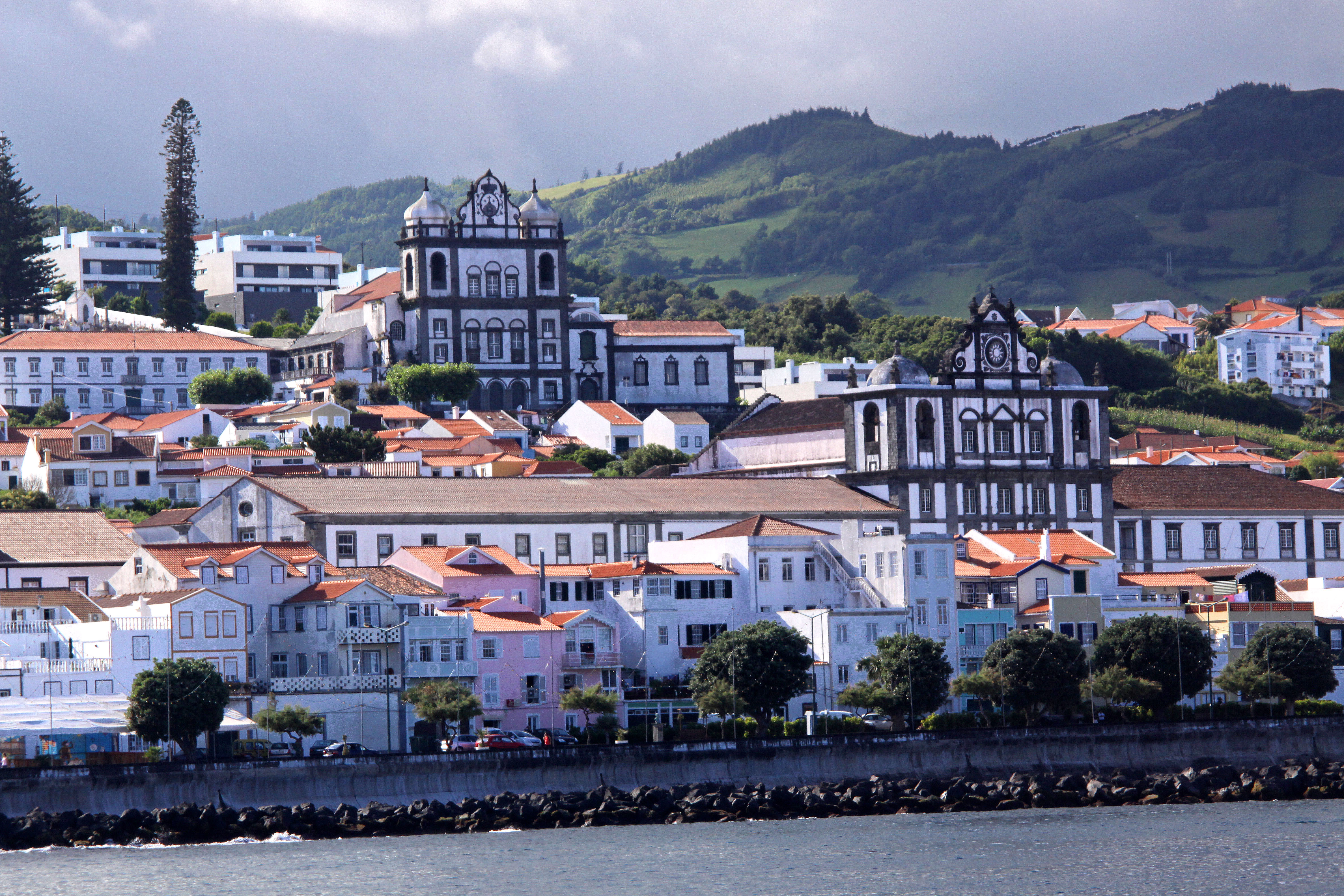 Açores, traversée en bateau entre Pico et Faial. Arrivée à Horta.